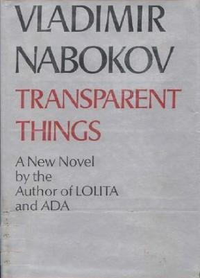 Обложка романов В. В. Набокова "Прозрачные вещи"